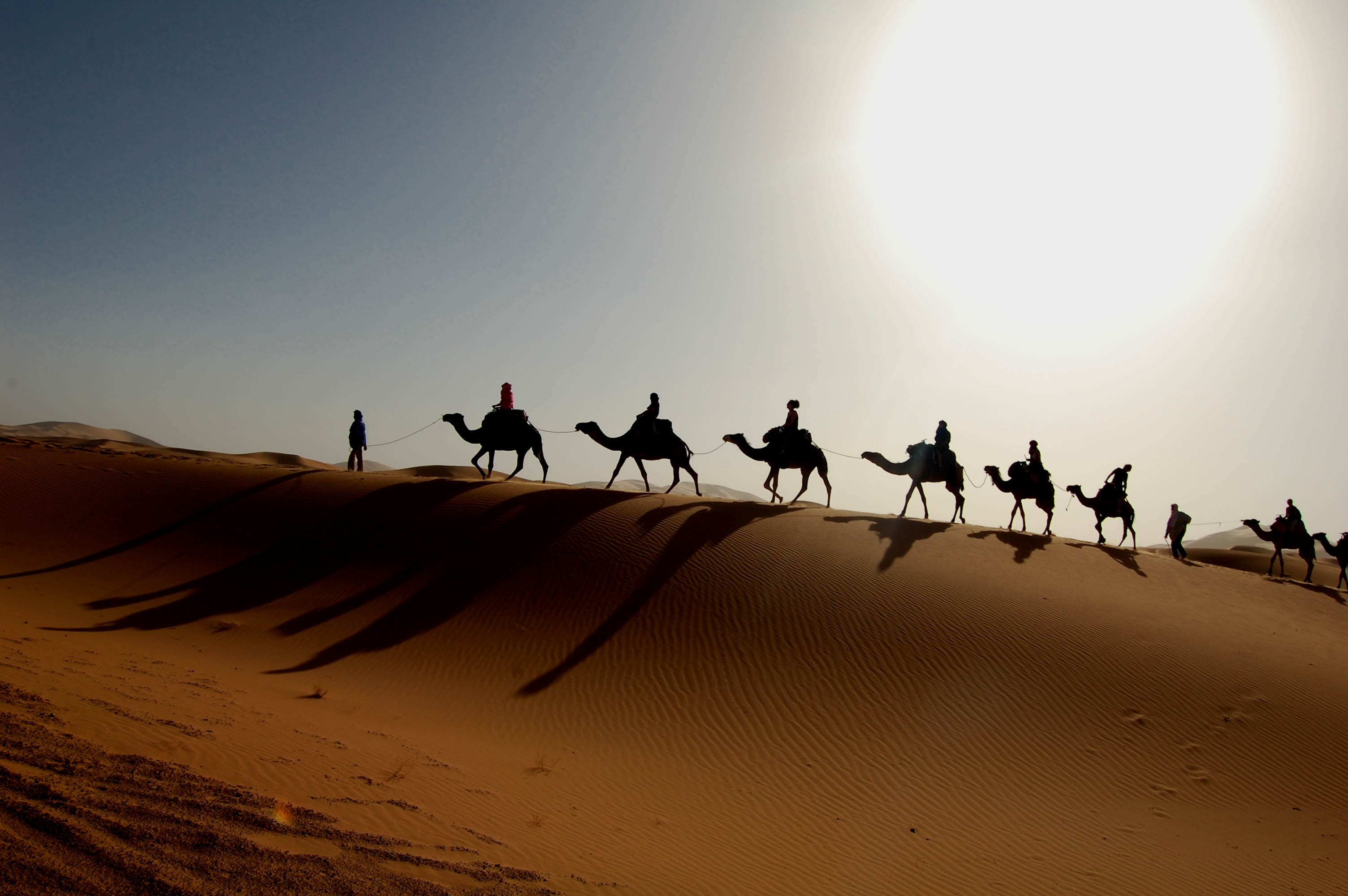 Caravane de dromadaires dans le désert marocain.